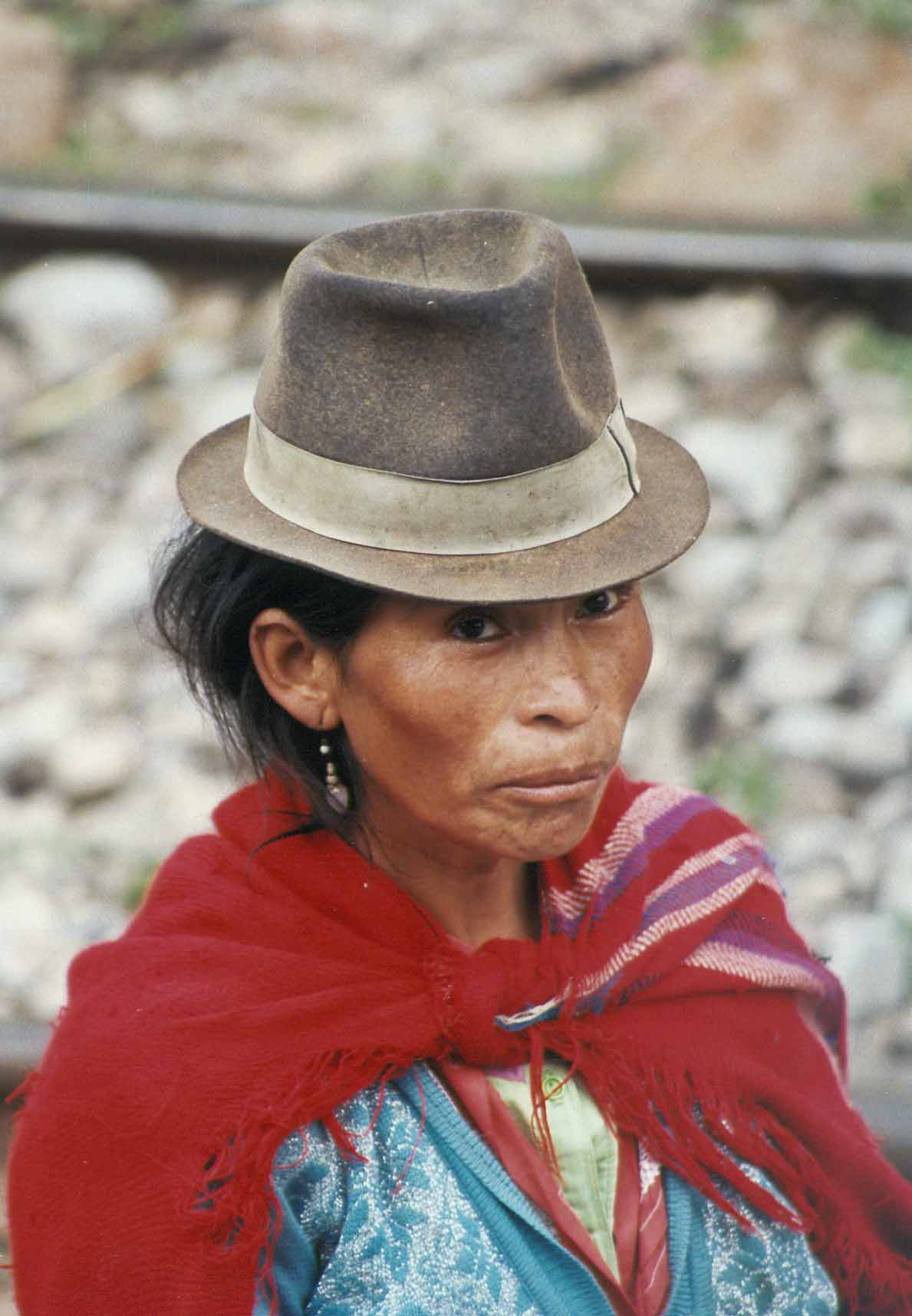 Kichwa-Indianerin aus Ecuador, Gegend von Alausí. Kečua Indijanka iz Ekvadora u blizini Alausí-a. Kichwa warmi, Alawsi llaqtayuq, Ikwadur mama llaqtamanta. Suradnik:Zeljko-pa rurasqan.